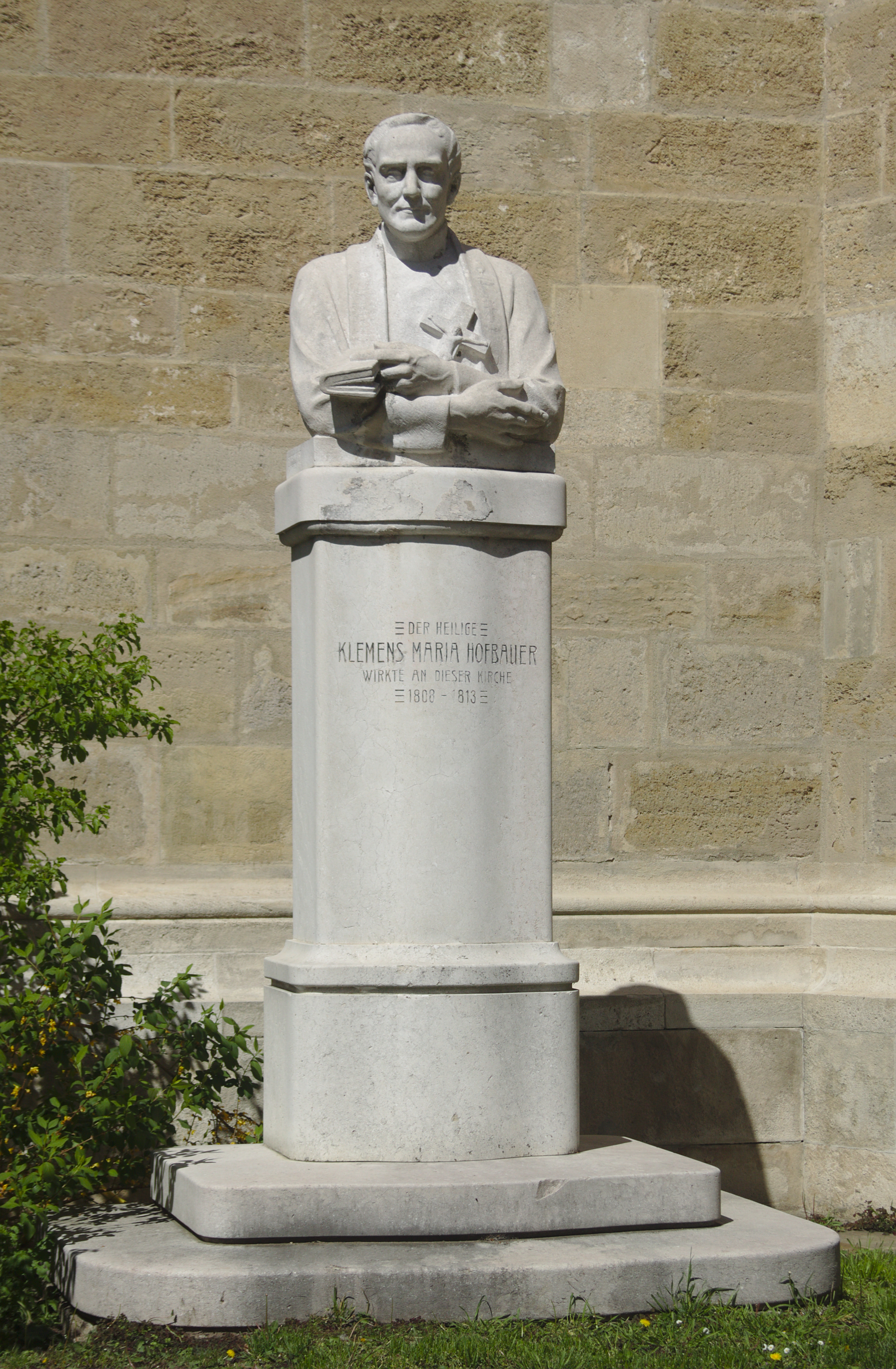 Clemens Maria Hofbauer-Denkmal